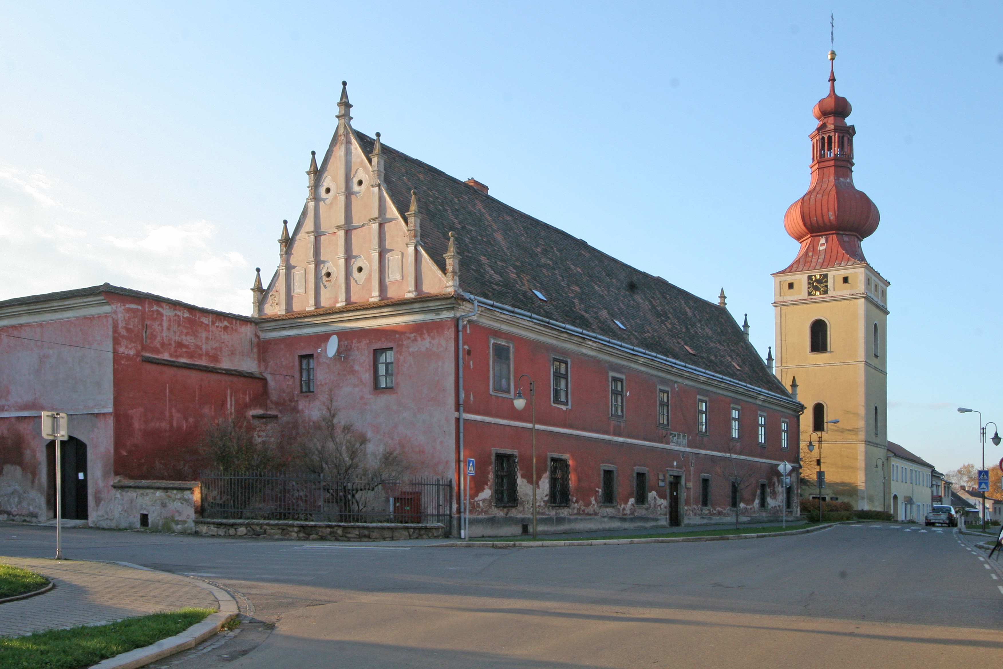 Děkanství (Golčův Jeníkov), Mírová 85, Golčův Jeníkov